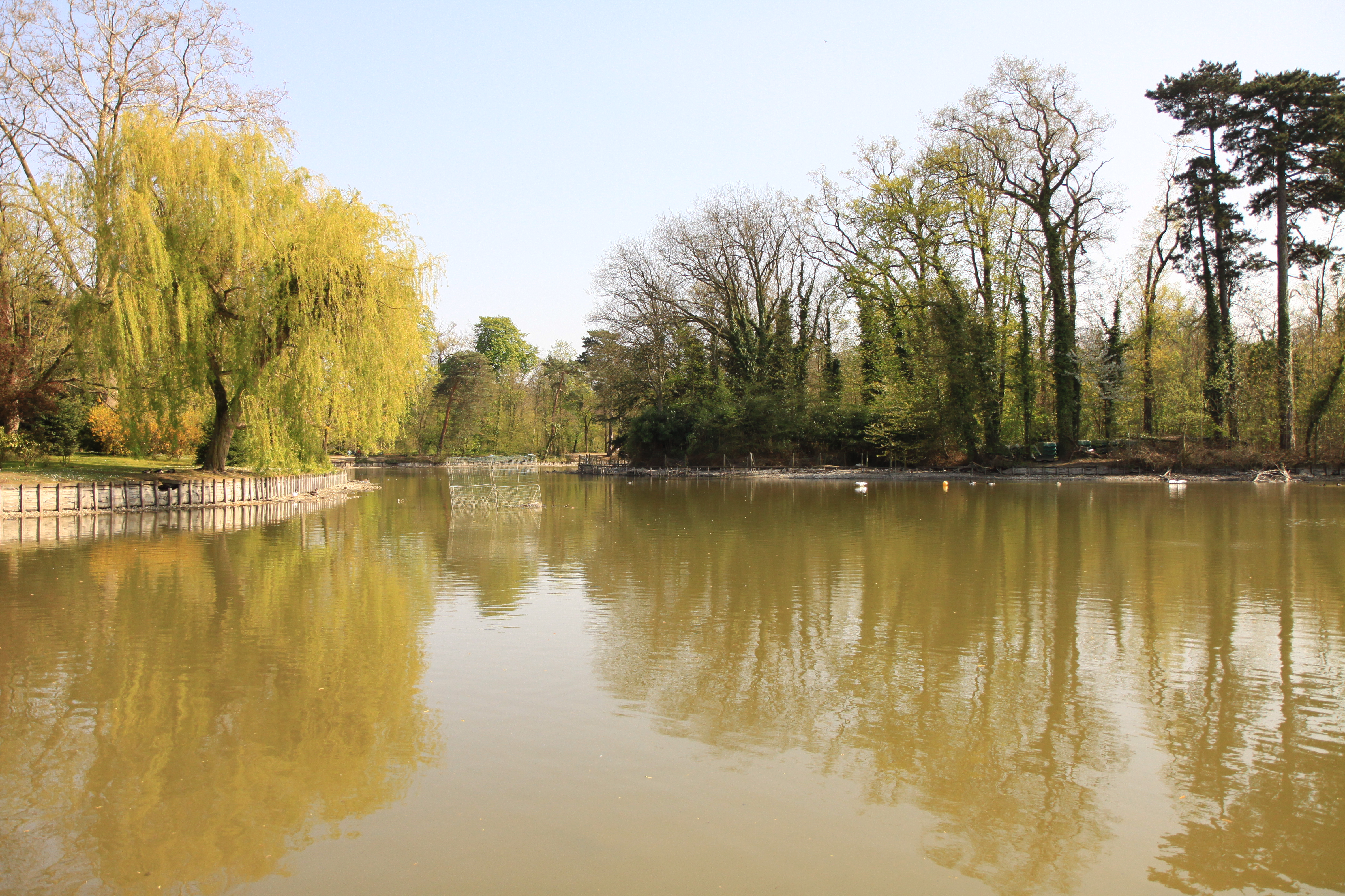 Le lac desMinimes après une vidange en avril 2010